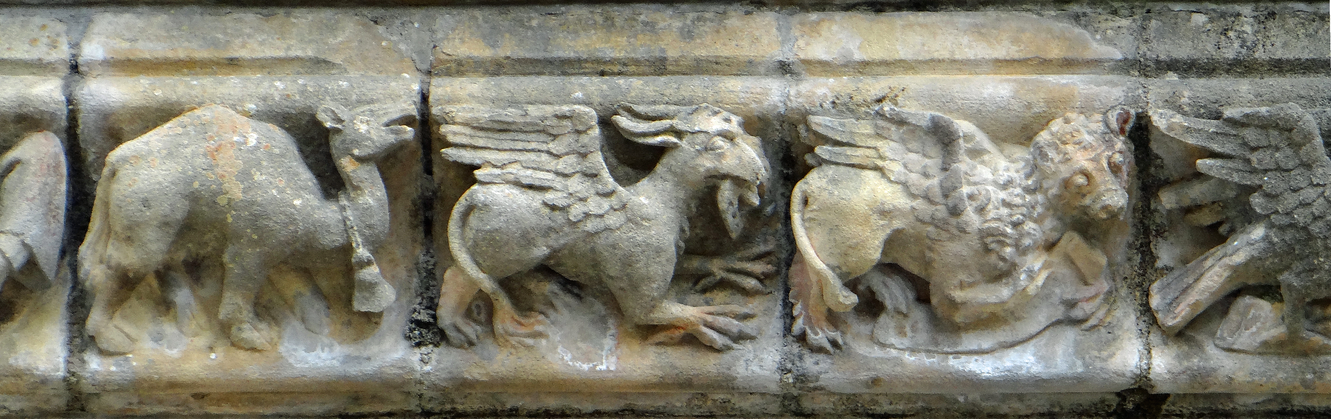 Église Saint-Laurent-et-Saint-Front de Beaumont-du-Périgord - Façade occidentale : détail de la frise